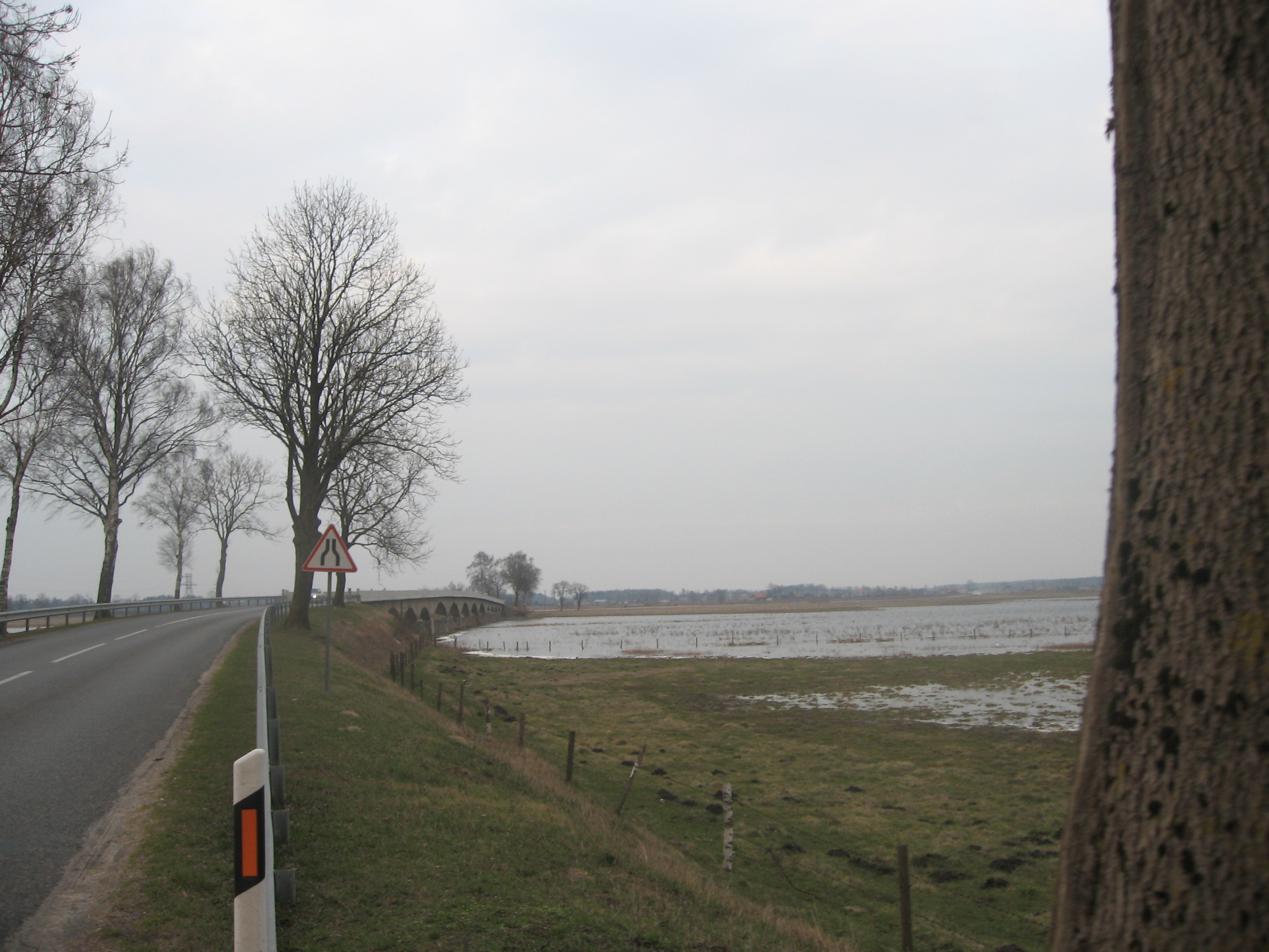 Šlažų tiltas